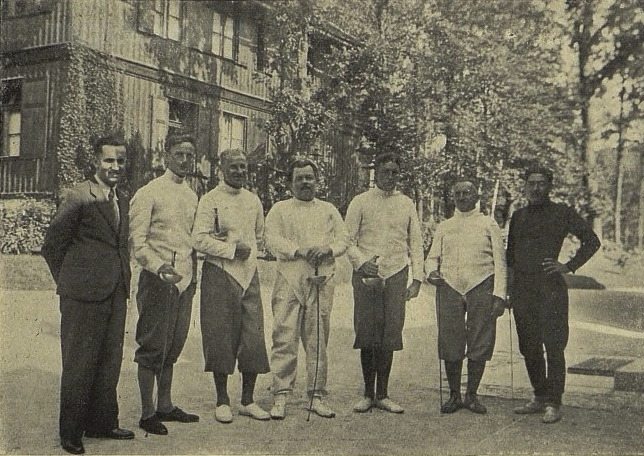 Adolf Schwarzenberg, šermířský turnaj Hluboká, 1935